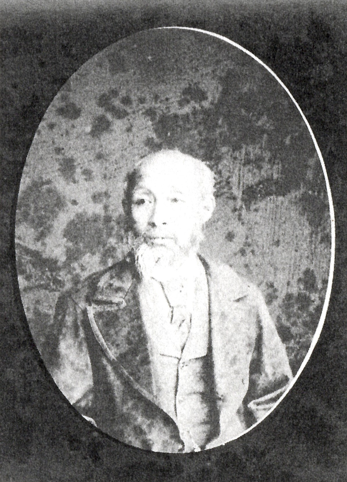 上杉勝道の肖像写真。